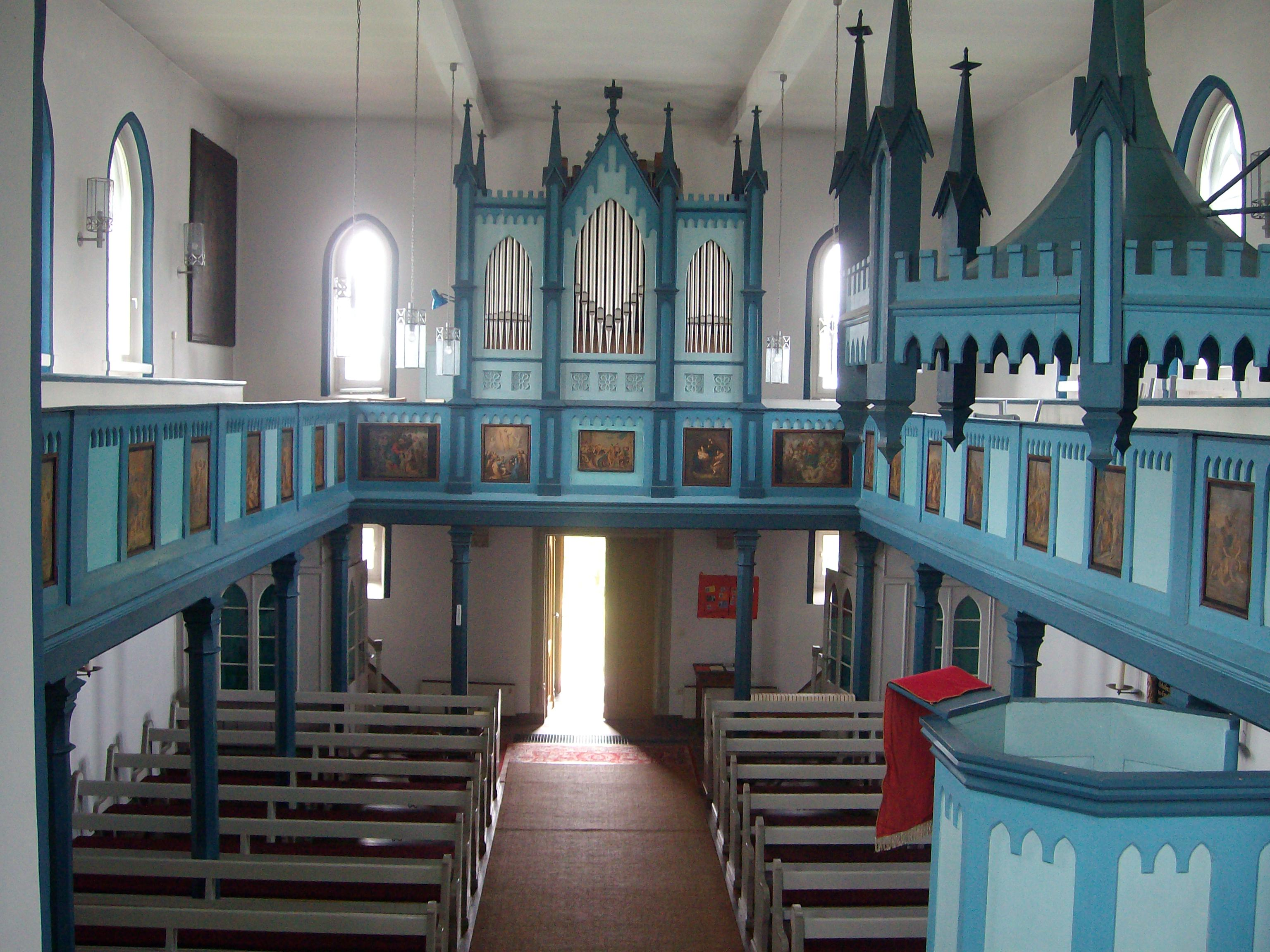 Evangelische Kirche Röthges, Laubach, Landkreis Gießen, Hessen, Deutschland